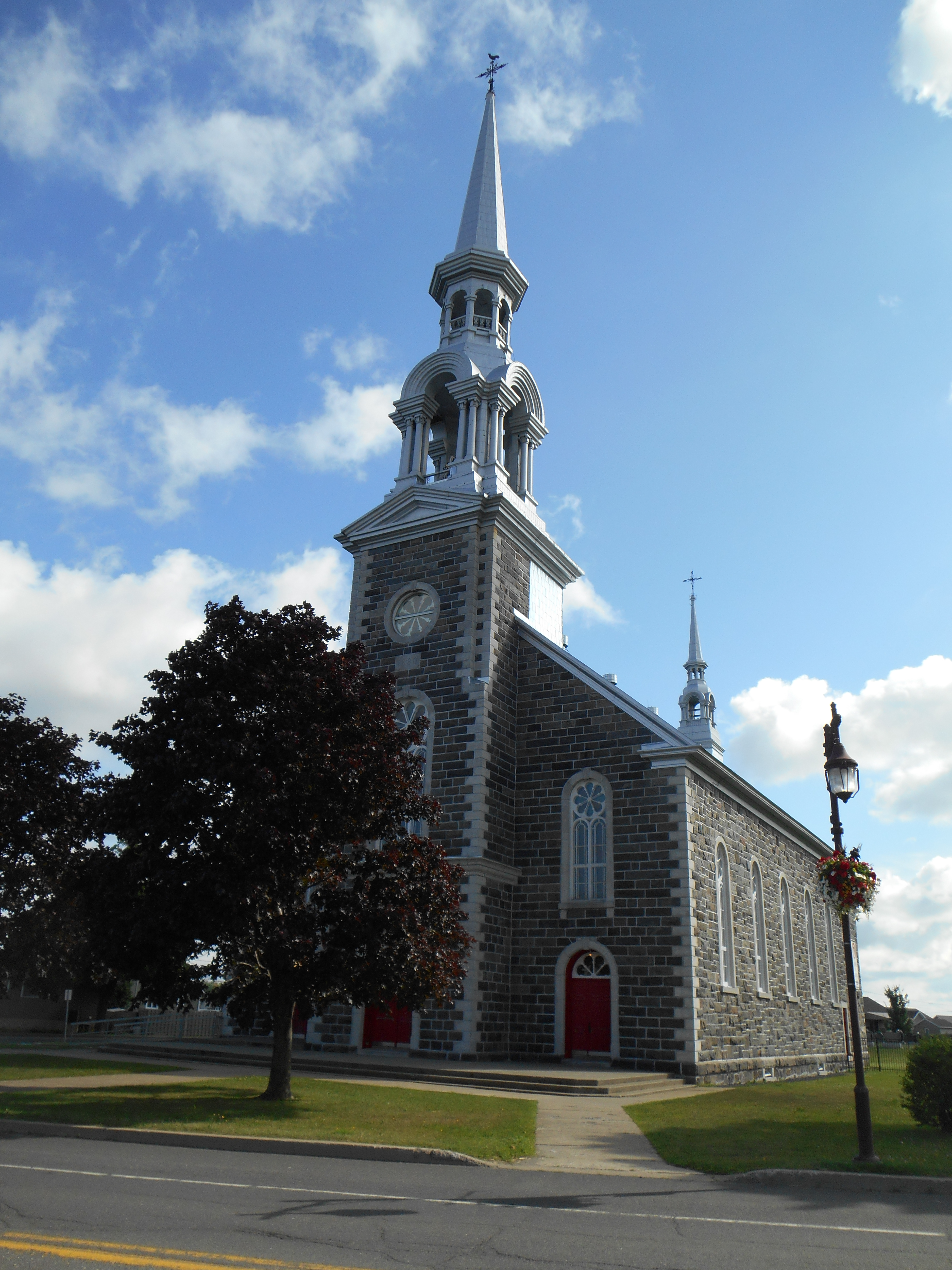 Église Saint-Flavien, rue Principale, Saint-Flavien, Québec